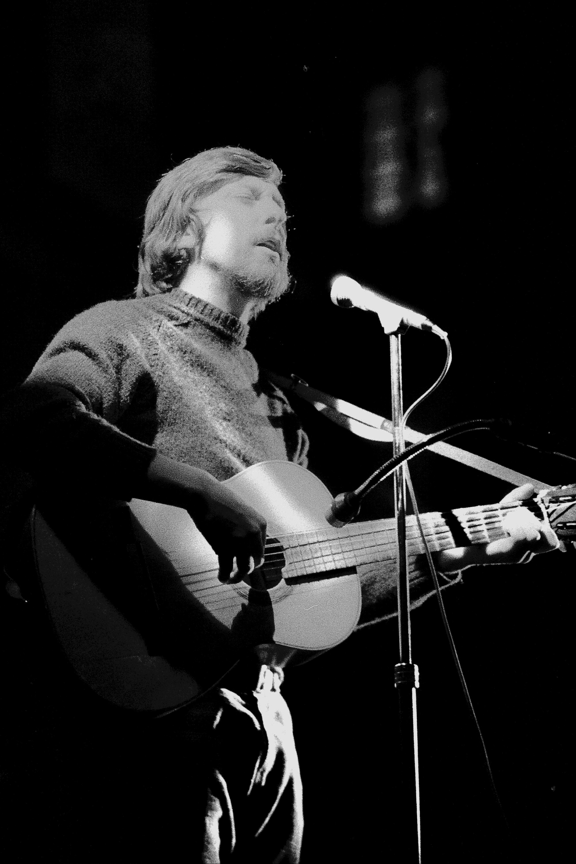 Benito Lertxundi abeslaria. Ez Dok Amairu taldea. 1971-9-7. Benito Lertxundi basque singer. Ez Dok Amairu group. 1971-9-7.